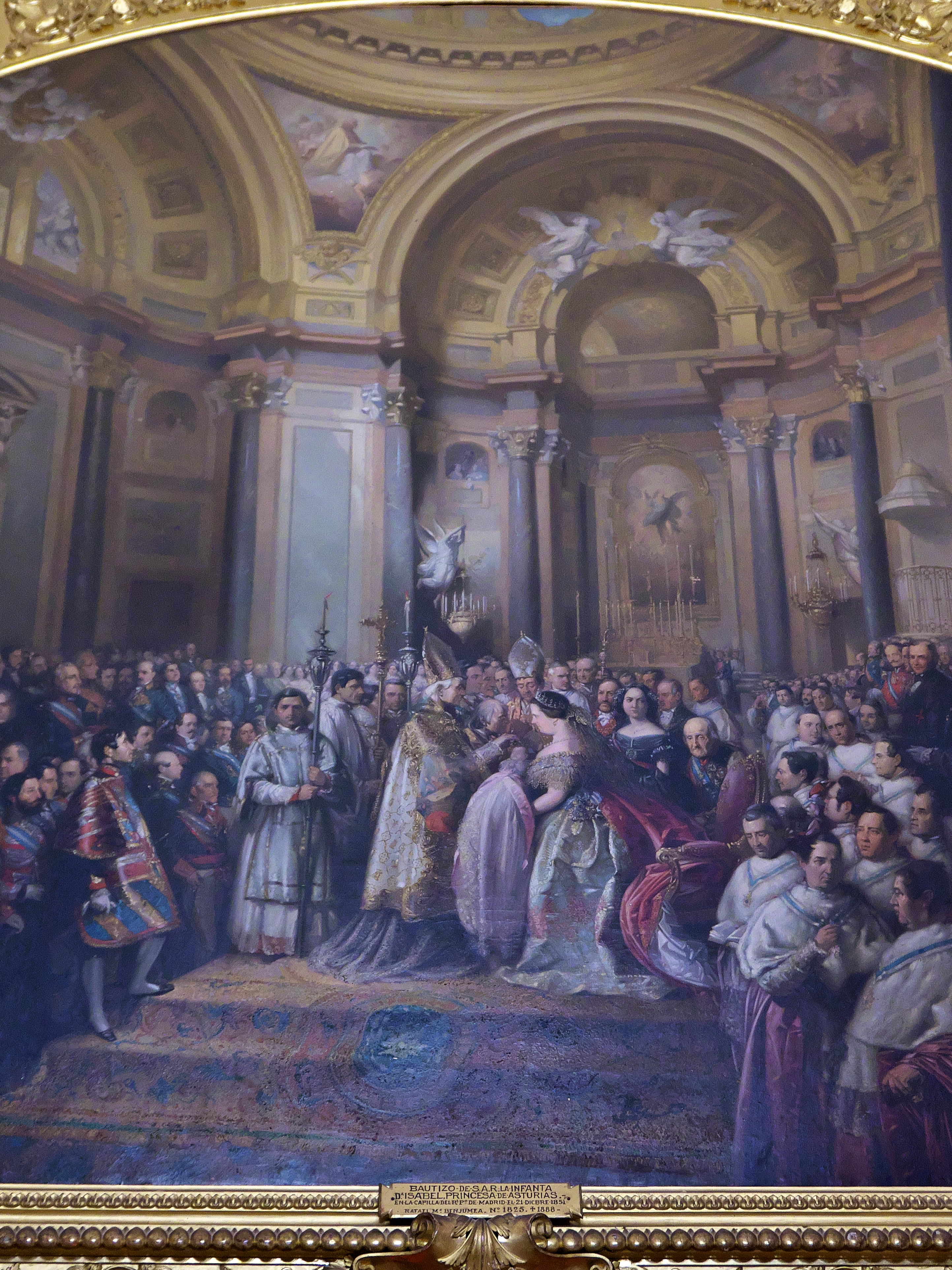 Palacio Real de Riofrío. El bautizo de Infanta Isabel, Princesa de Asturias en la capilla real del Palacio Real de Madrid.